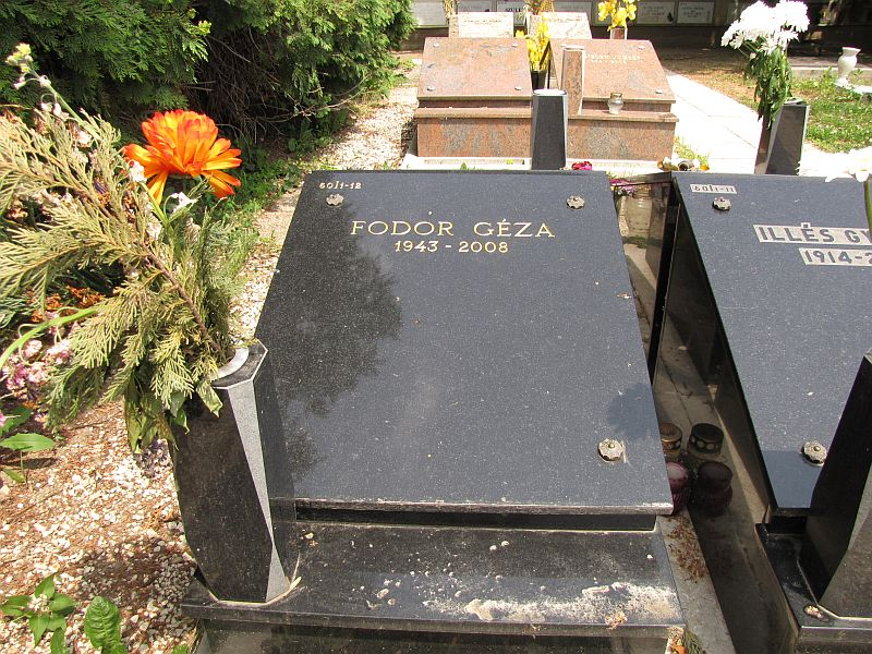 Fodor Géza (1943. május 2. – 2008. október 7.) magyar dramaturg, esztéta, egyetemi docens sírja Budapesten. Farkasréti temető: 60/1-burkolt-12